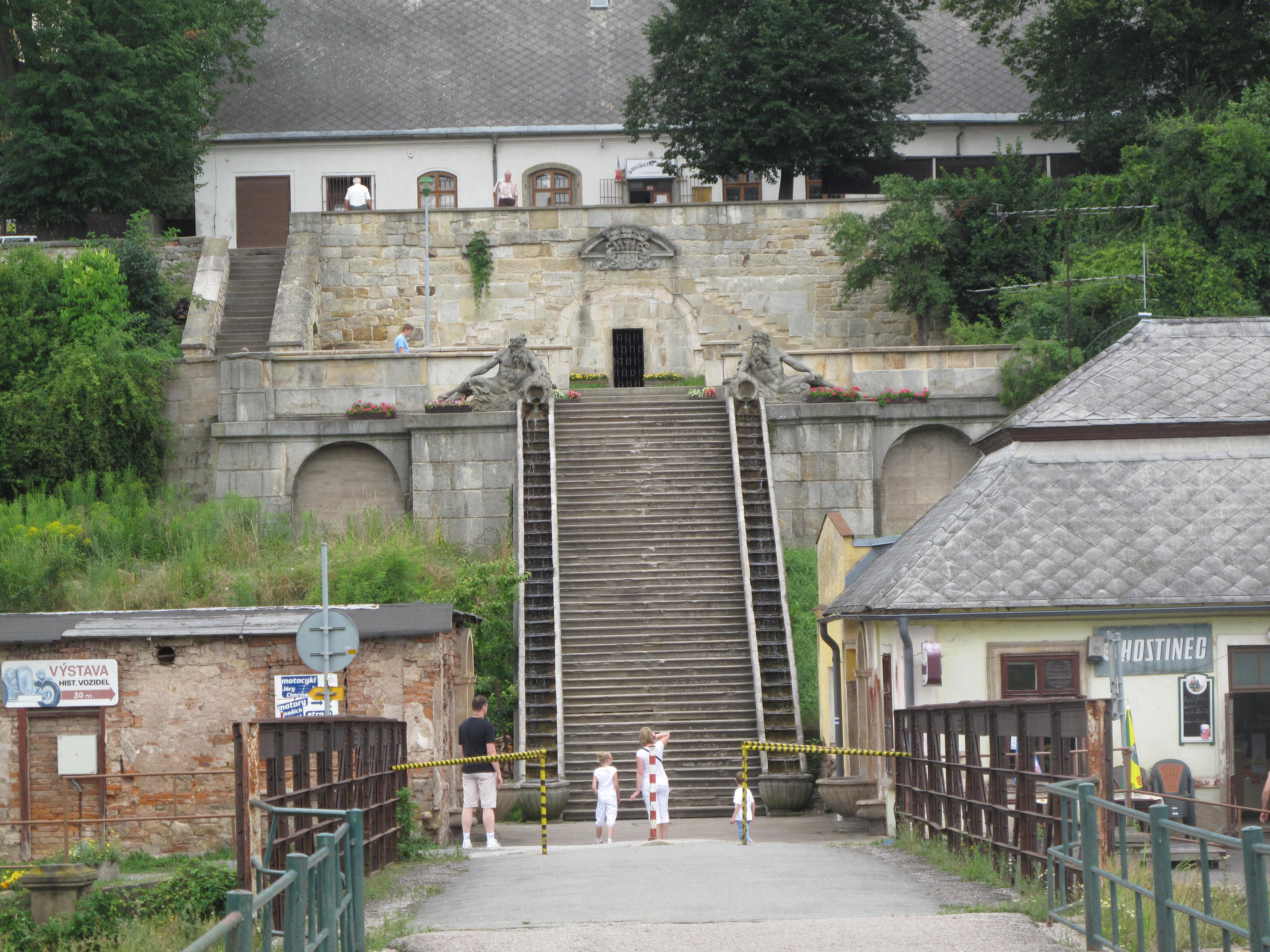 Kuks, schody (kdysi k zámku)